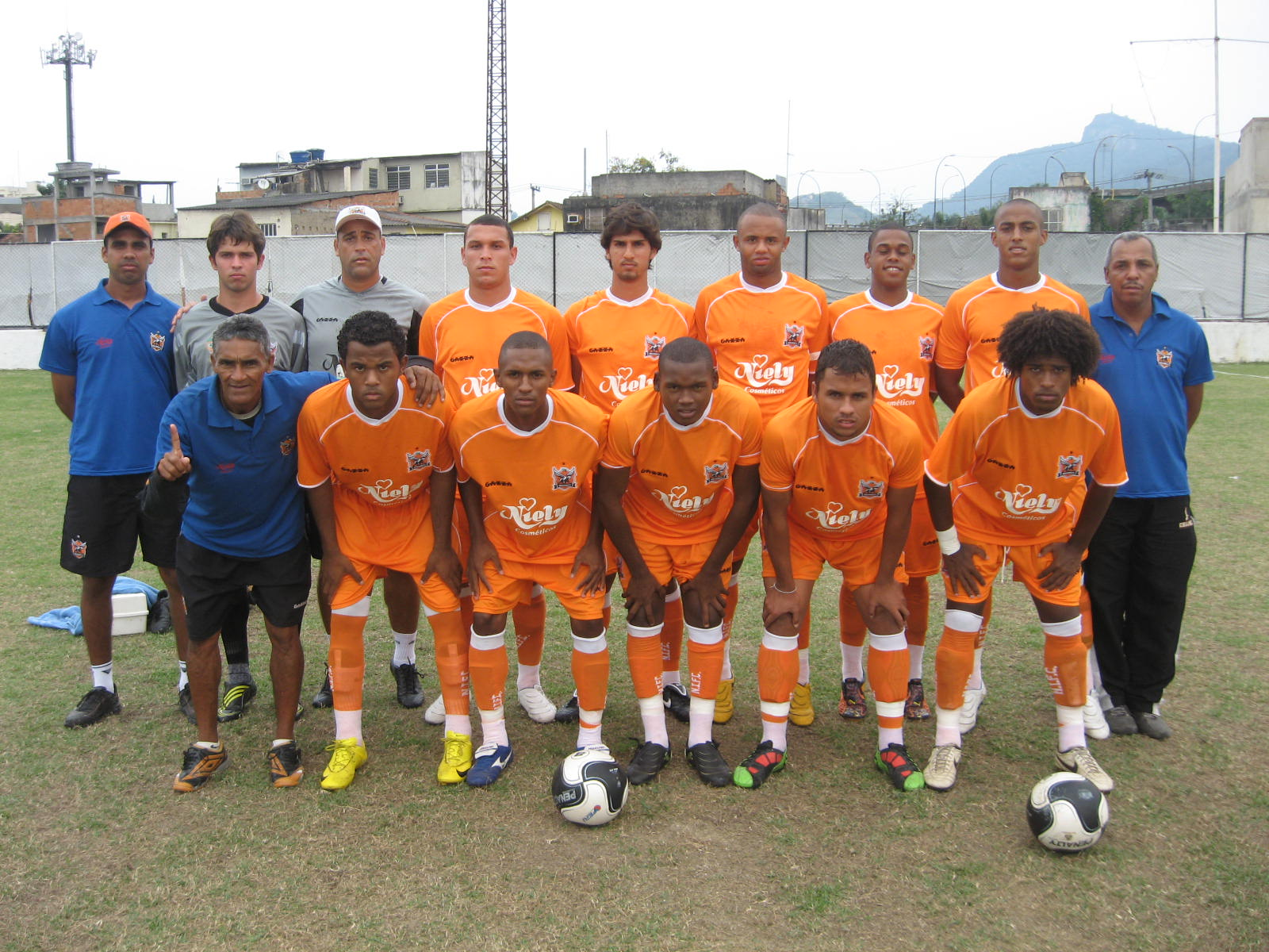 Formação de Juniores do Nova Iguaçu em 2010.